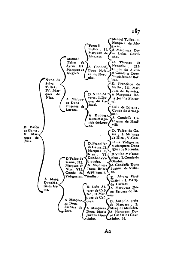 Página 175 das "Memorias Historicas e Genealogicas dos Grandes de Portugal" - Costados dos Marqueses de Nisa.